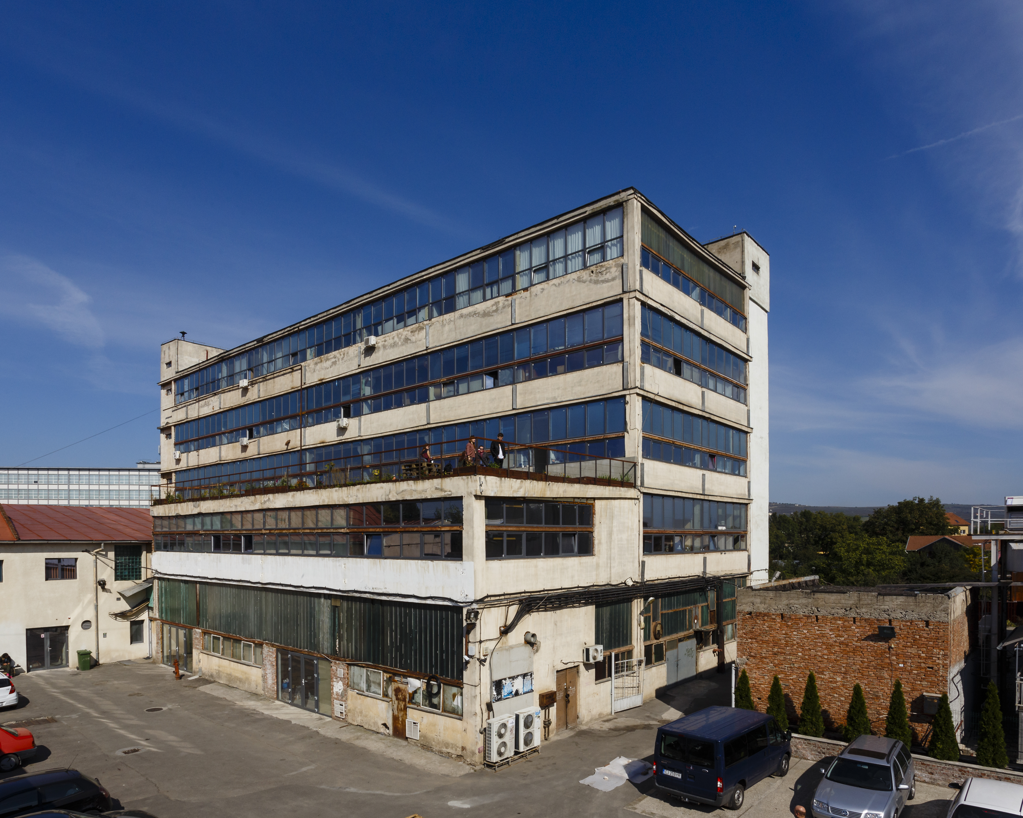 foto: Roland Vaczi